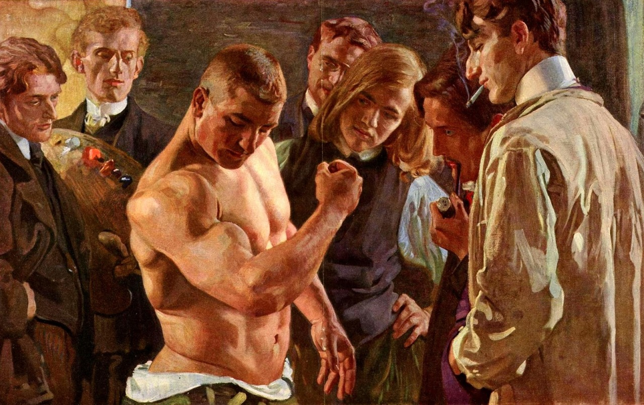 Osmar Schindler, Muskelspiel, 1907